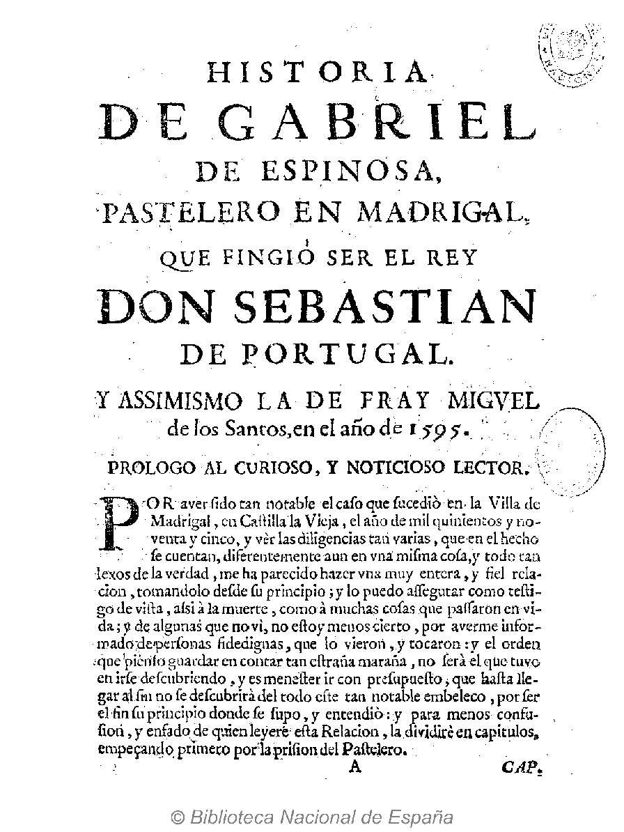 Historia de Gabriel de Espinosa, pastelero en Madrigal : que fingió ser el Rey Don Sebastian de Portugal : y assimismo la de fray Miguel de los Santos, en el año de 1595 Autor: Tarazona, Juan Antonio Fecha: 1683 Datos de edición: En Xerèz por Juan Antonio de Tarazona